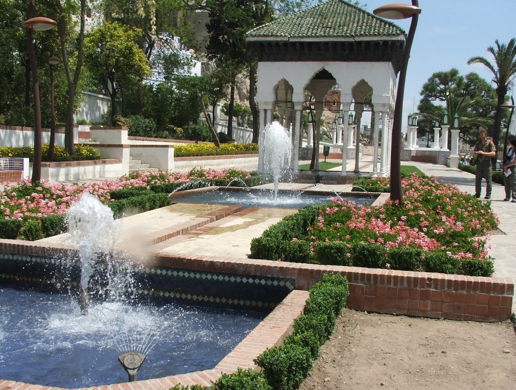 Jardines de Cagigas en Tetuán